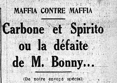 L'Écho de Paris titre en une, le 26 avril 1934, "Mafia contre Mafia. Carbone et Spirito ou la défaite de M. Bonny…"